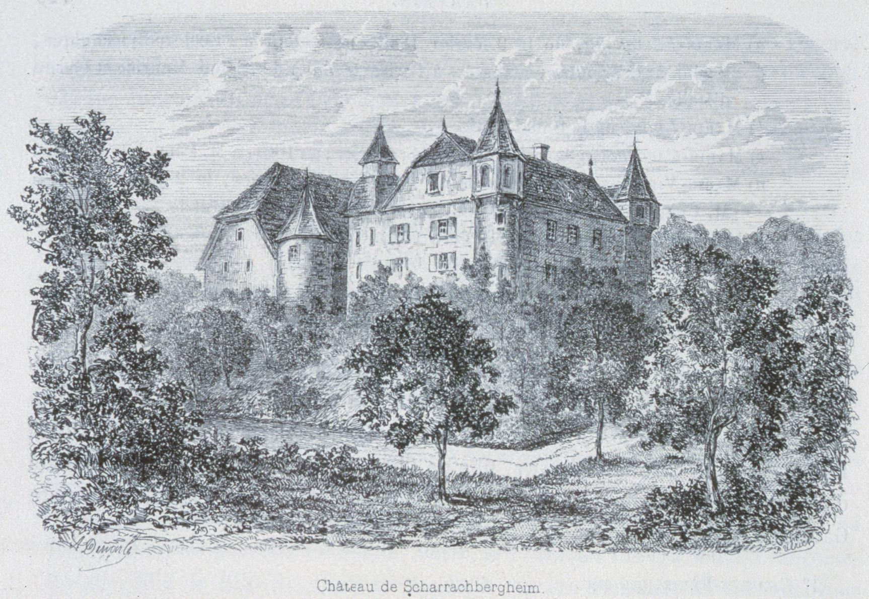 "Château de Scharrachbergheim", Vue générale ,de E. LEHR, ill., A. DEMARLE, ill. et P. ULRICH, graveur (1870). Publication Strasbourg : Impr. Vve Berger-Levrault, 1870. Notes Cote(s) du document original : M.21.417. - . In : L'Alsace Noble suivie de Le Livre d'Or du Patriciat de Strasbourg par Lehr E. . - Strasbourg, Impr. de Vve Berger-Levrault, 1870, Tome 2, (p. 130); NBI 1. BIBLIOTHÈQUE NUMÉRIQUE : NIM.21020